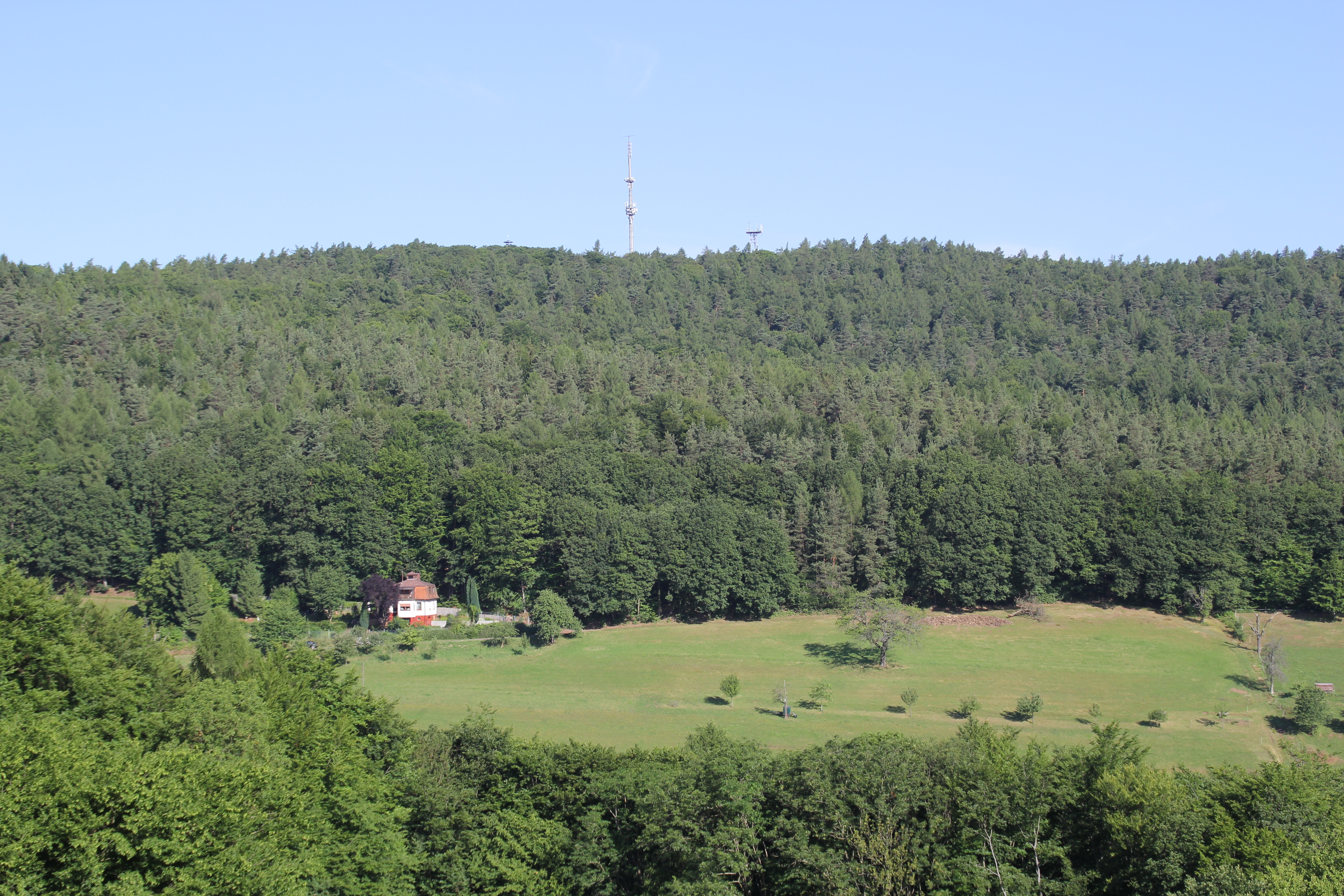 Der Gipfelbereich des Hahnenkamms im westlichen Spessart in Bayern